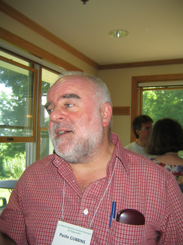 Paul Gubbins dum NASK la 10-an de julio 2005. Fotis Steven Brewer. Fonto